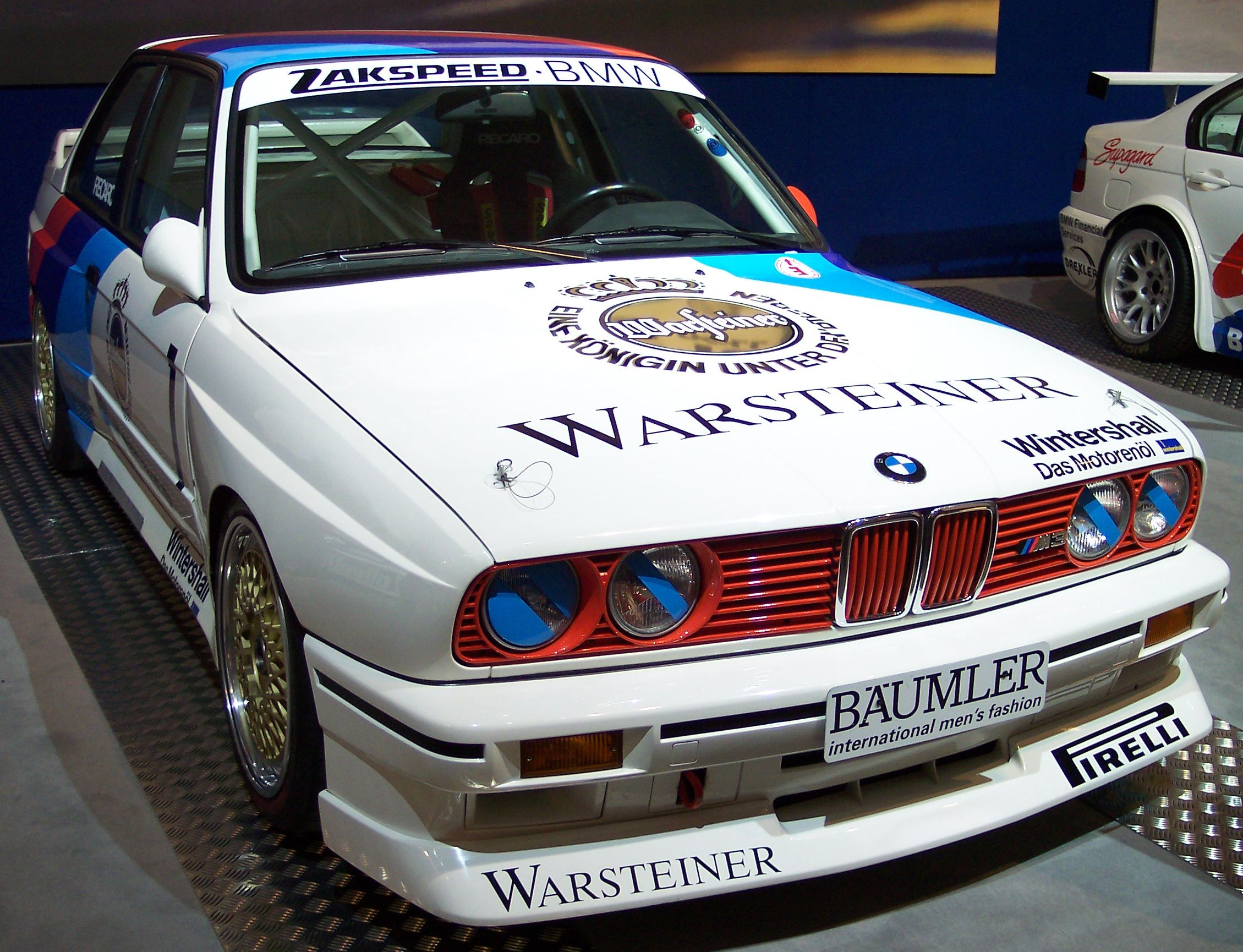 BMW M3 Gruppe A DTM 2,3 1987